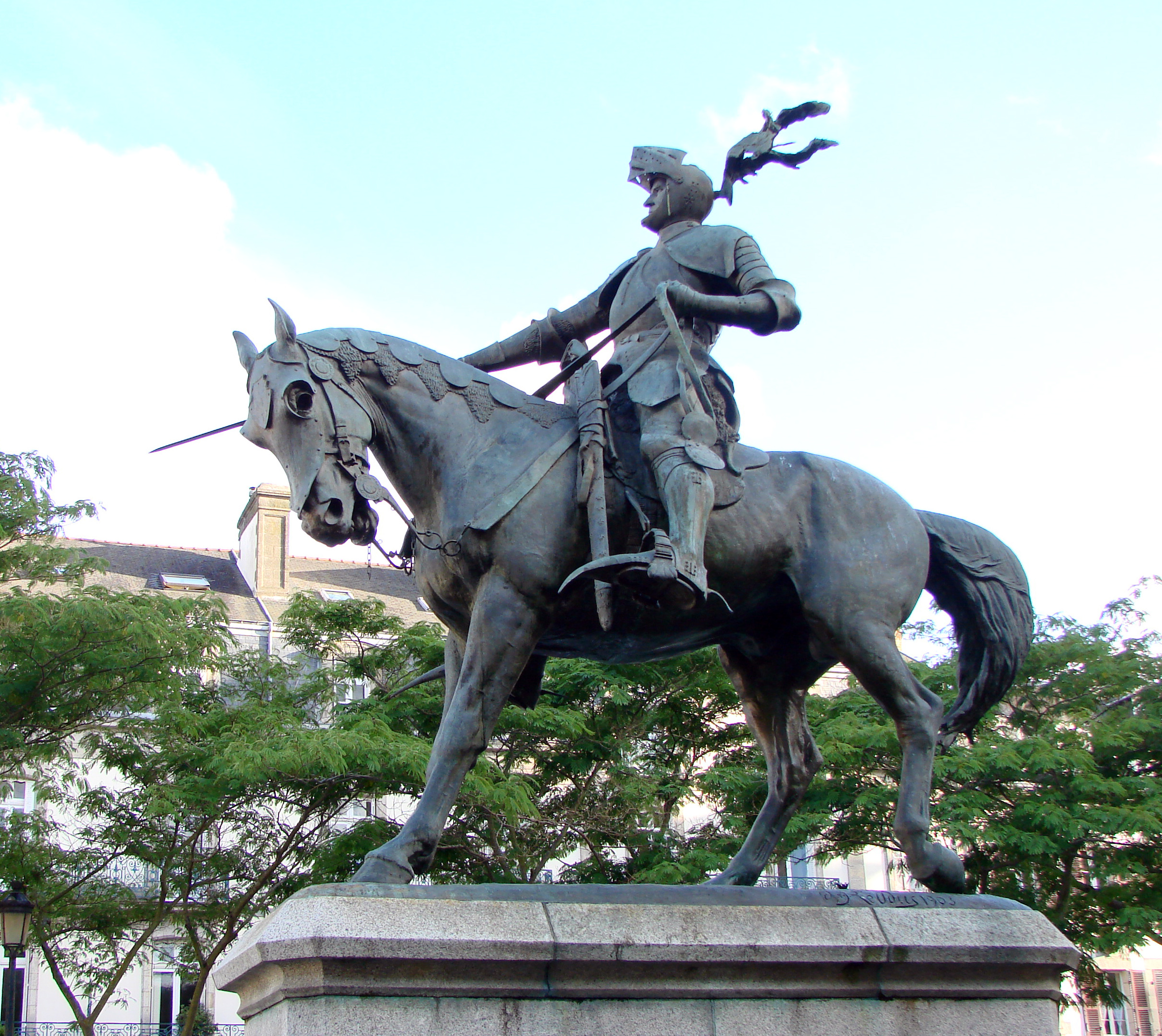 Statue du connétable de Richemont (1393-1458) par Arthur Jacques Le Duc (1848-1918), devant l'hôtel de ville de Vannes.La statue est datée de 1903.